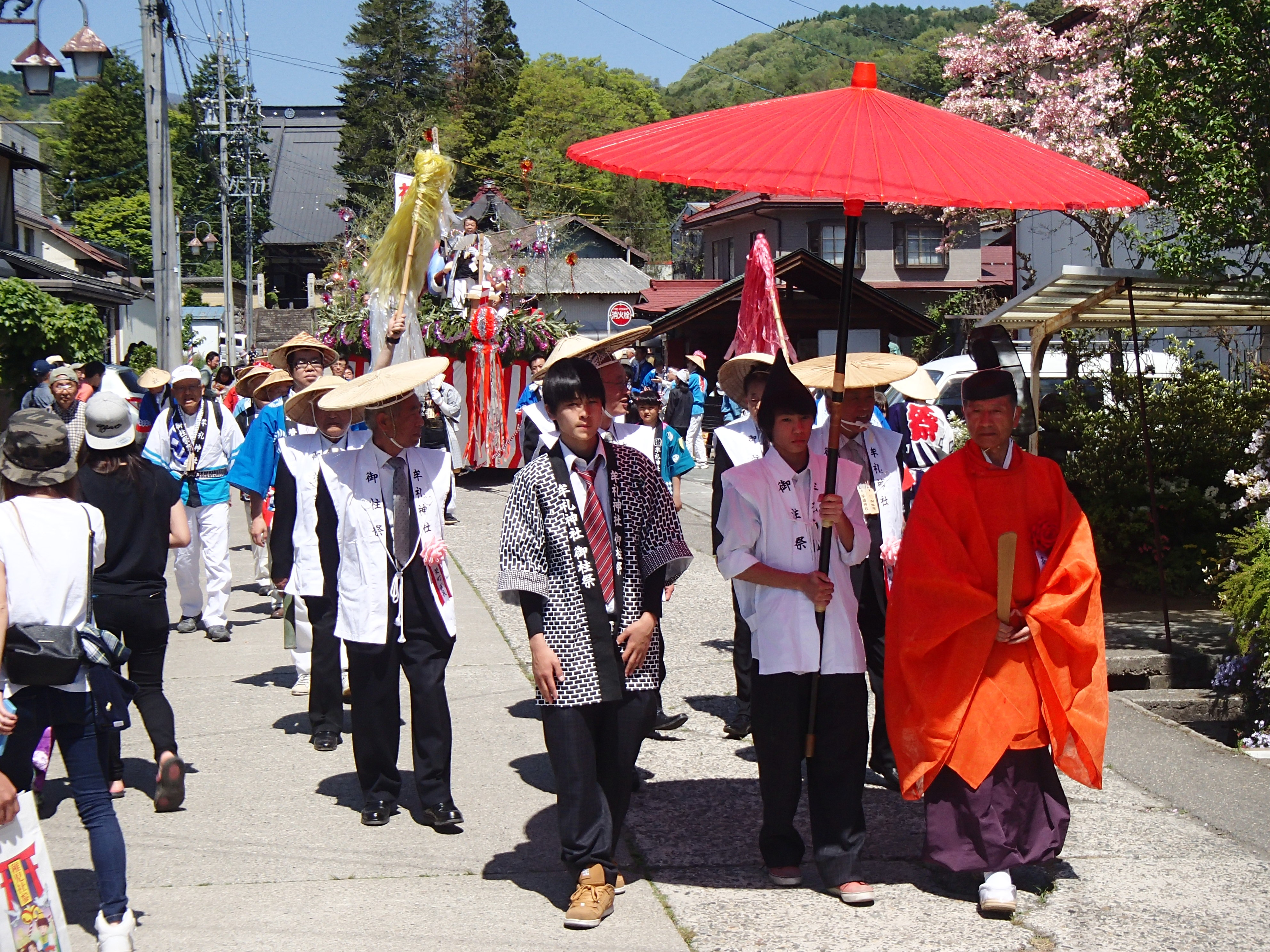 神官ほか参列者